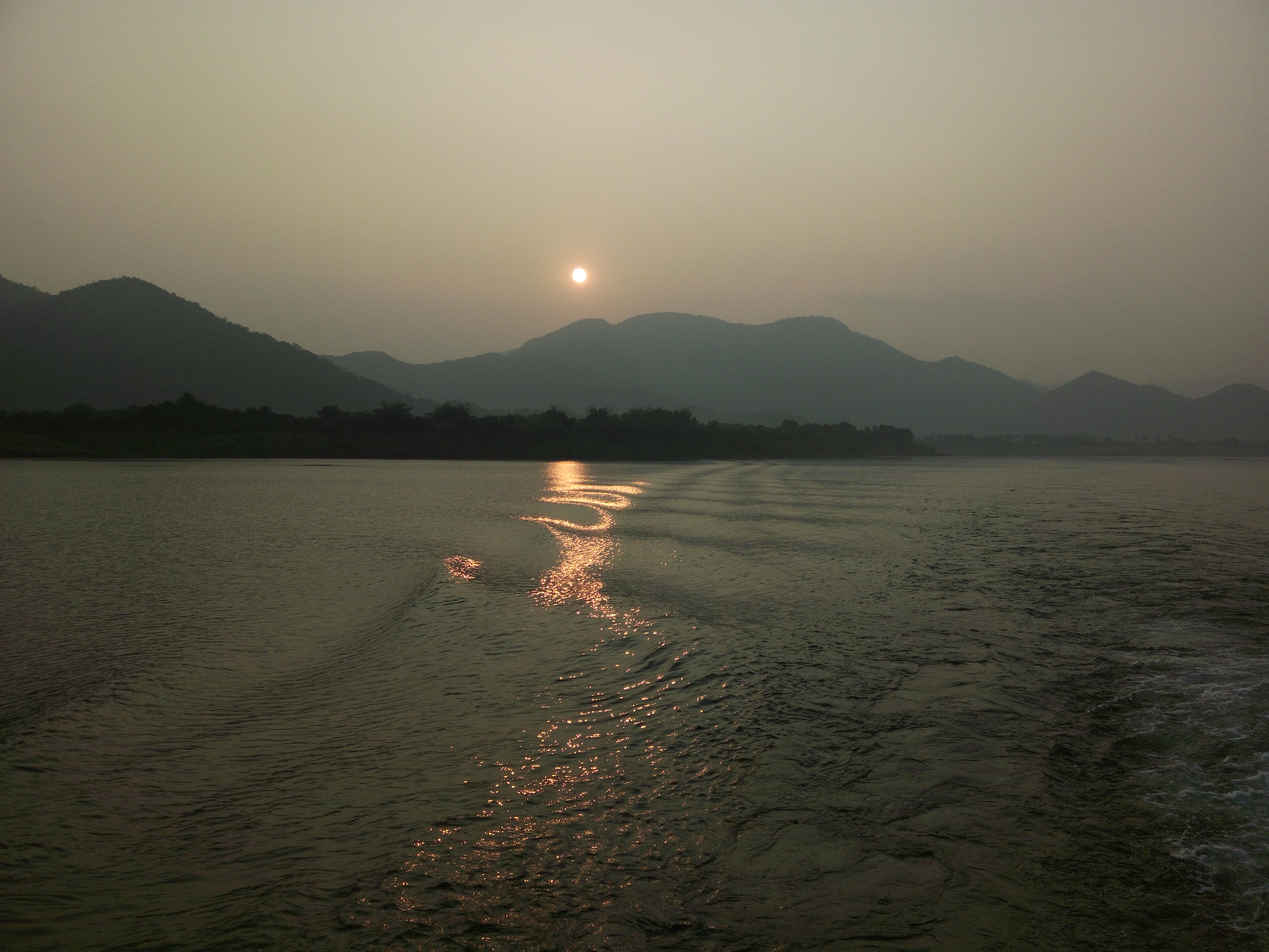 sunset godavari AP